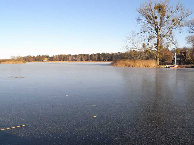 Blick vom Fähranleger auf die Burgwallinsel im Teterower See